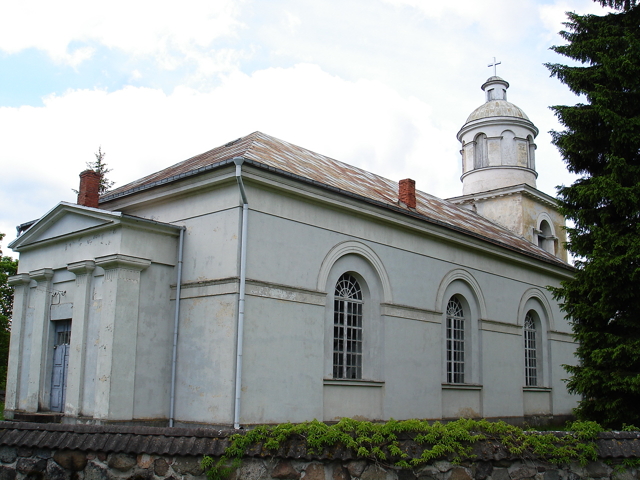 Eglise luthérienne de SunaksteLatviešu: Sunākstes baznīca (1)